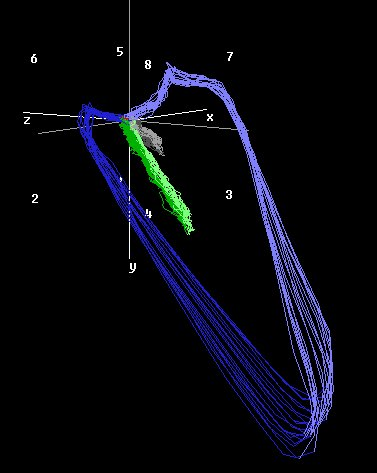 Beispiel eines Vektorkardiogramms mehrerer übereinandergezeichneter Pulsschläge. Grau=P-Schlinge, Blau=R-schlinge, Grün=T-Schlinge.